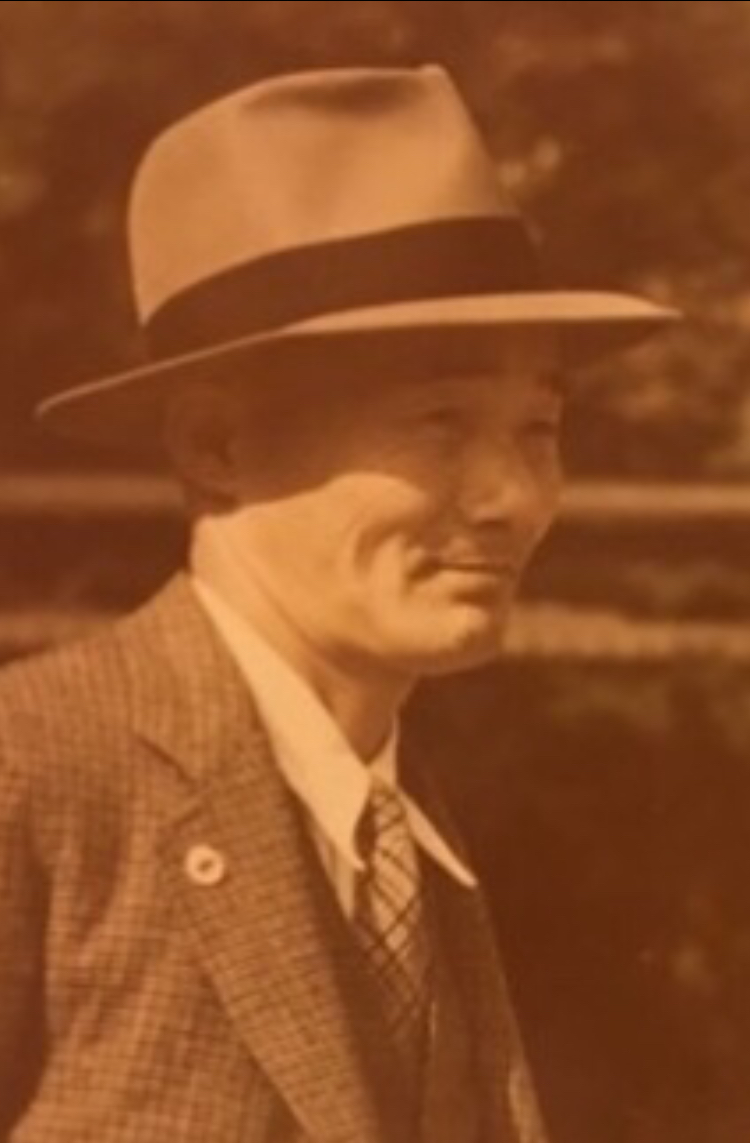 原甚之丞